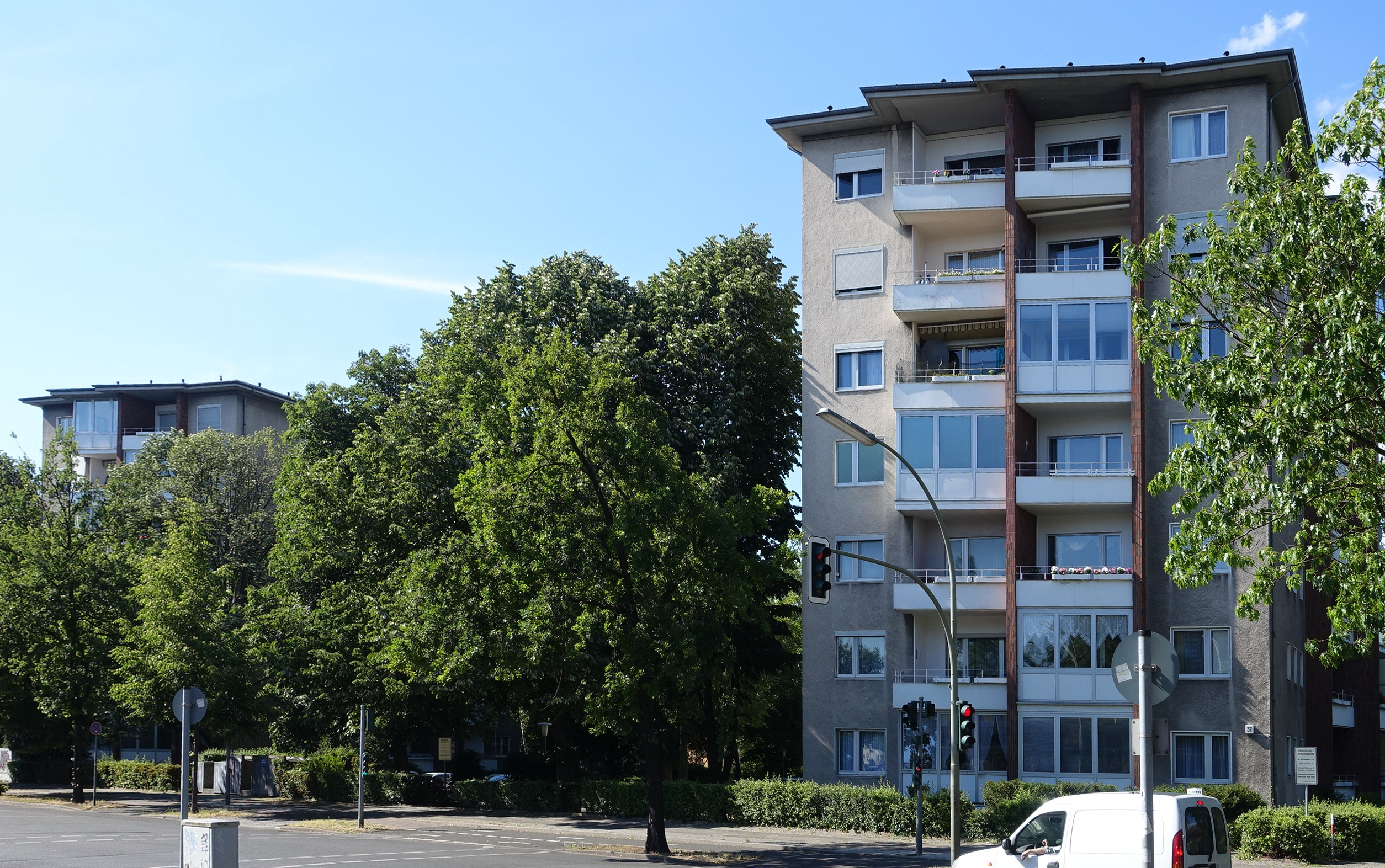 Hochhäuser